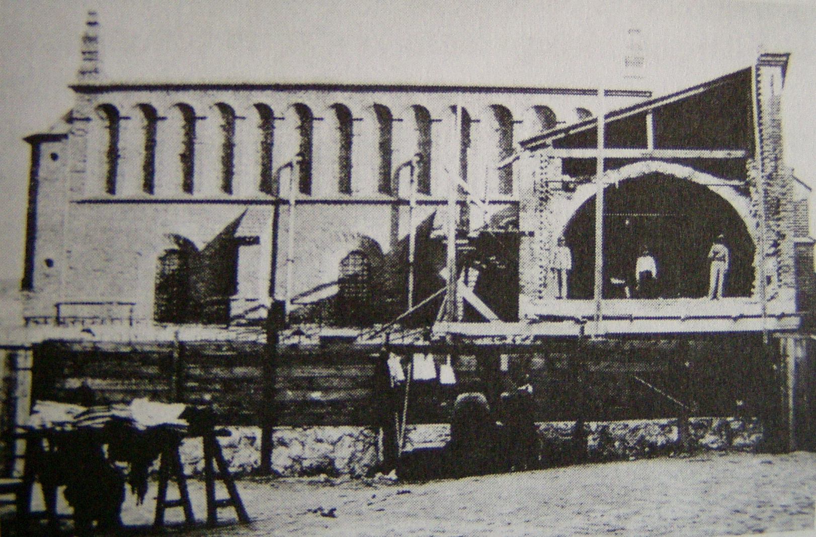 Stara Synagoga w Krakowie w trakcie przebudowy w 1923 roku